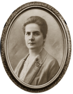 Francisca Senhorinha da Motta Diniz